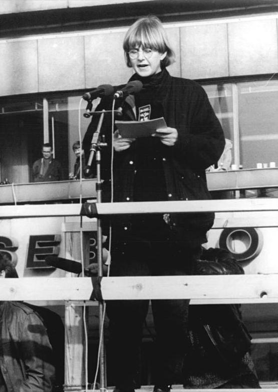 ADN-ZB Link 4.11.89 Berlin: Demonstration 500.000 Bürger beteiligten sich an einer Demonstration für den Inhalt der Artikel 27 und 28 der Verfassung der DDR. Auf dem anschließenden Meeting auf dem Alexanderplatz ergriff auch Marianne Birthler das Wort.